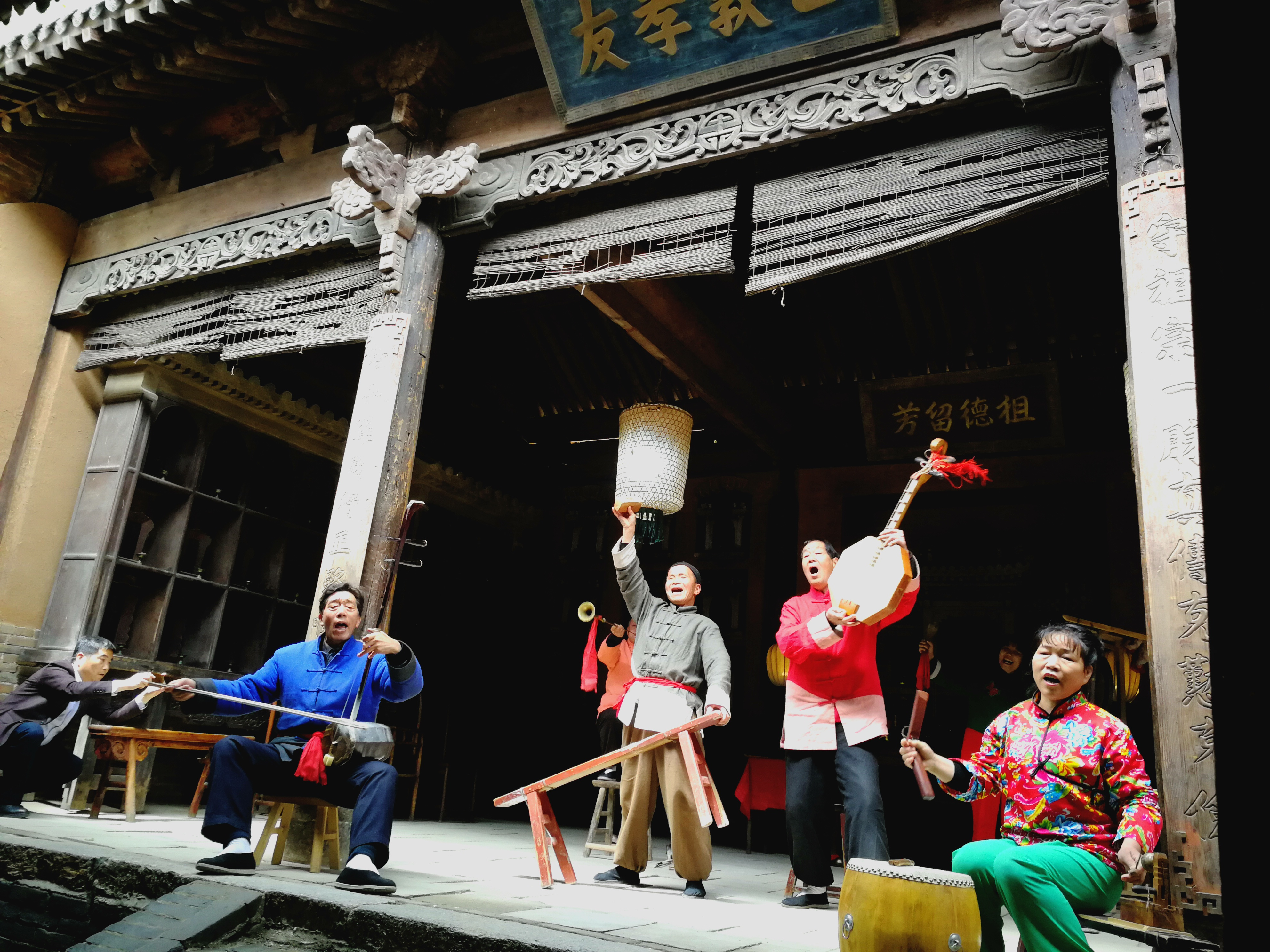 西安市蓝田县白鹿原影视城